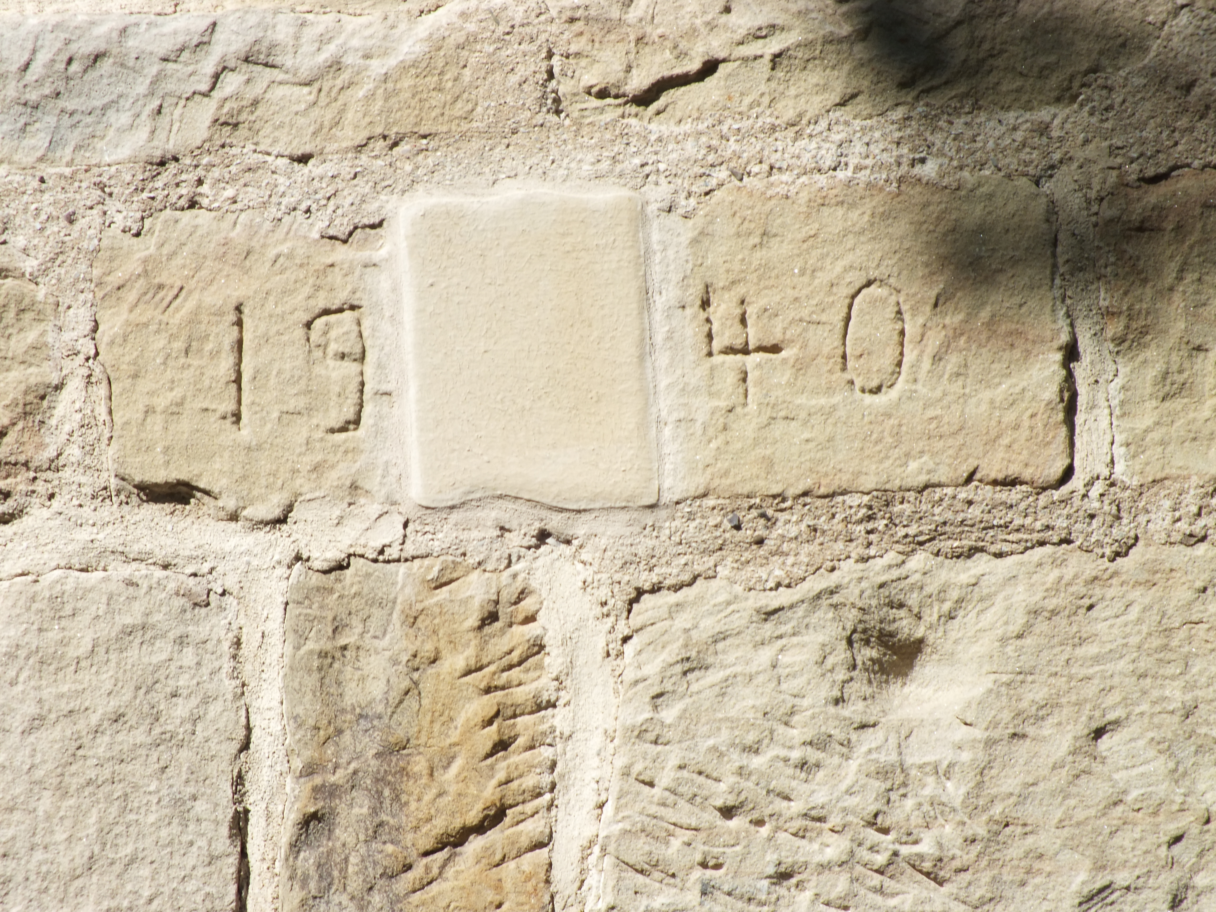 Hochschule Trier, Hauptcampus (Standort Schneidershof) - Gebäude L, Zierstein an der Frontseite in ca 3m Höhe mit Jahr 1940 und überdecktem Hakenkreuz